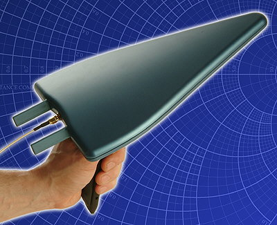 EMV Breitband Antenne HyperLOG 60180 von 680MHz bis 18GHz der Aaronia AG